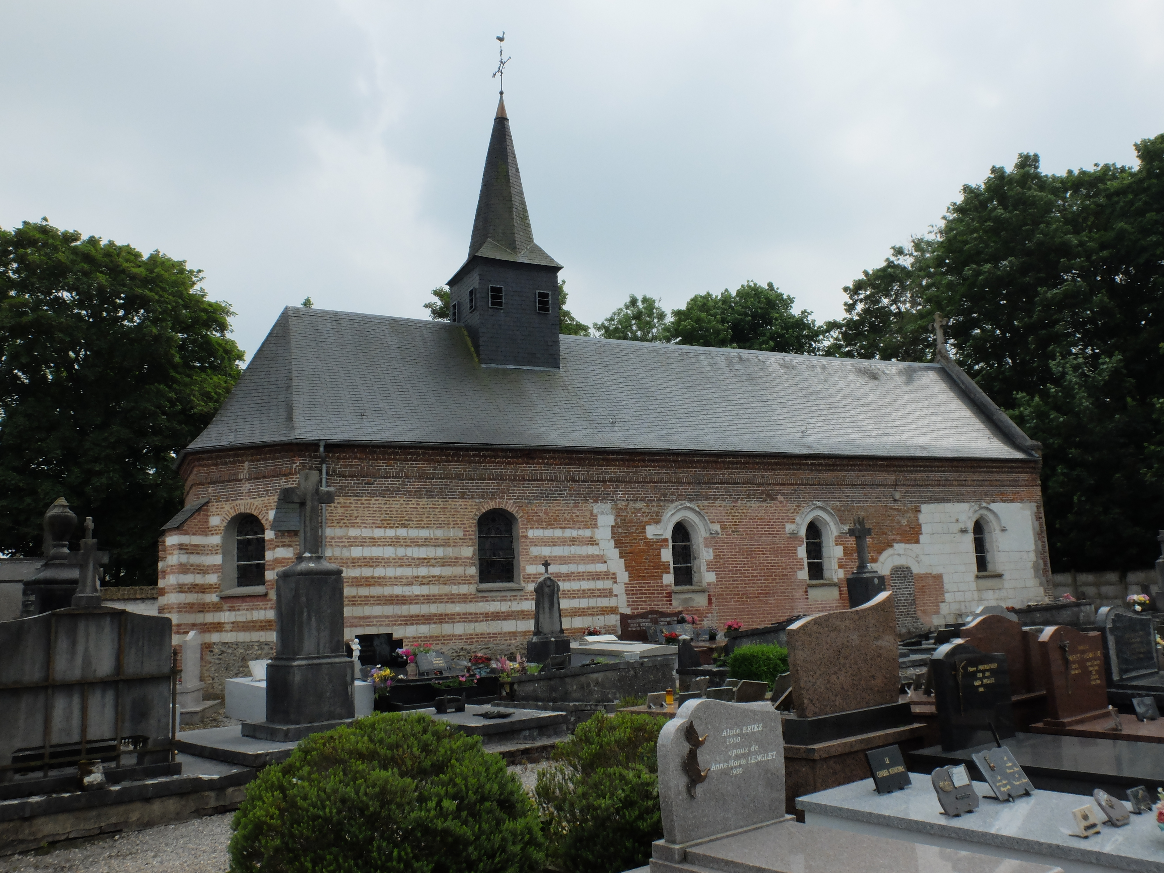 Vue de l'église Saint-Vaast de Campigneulles-les-Grandes.